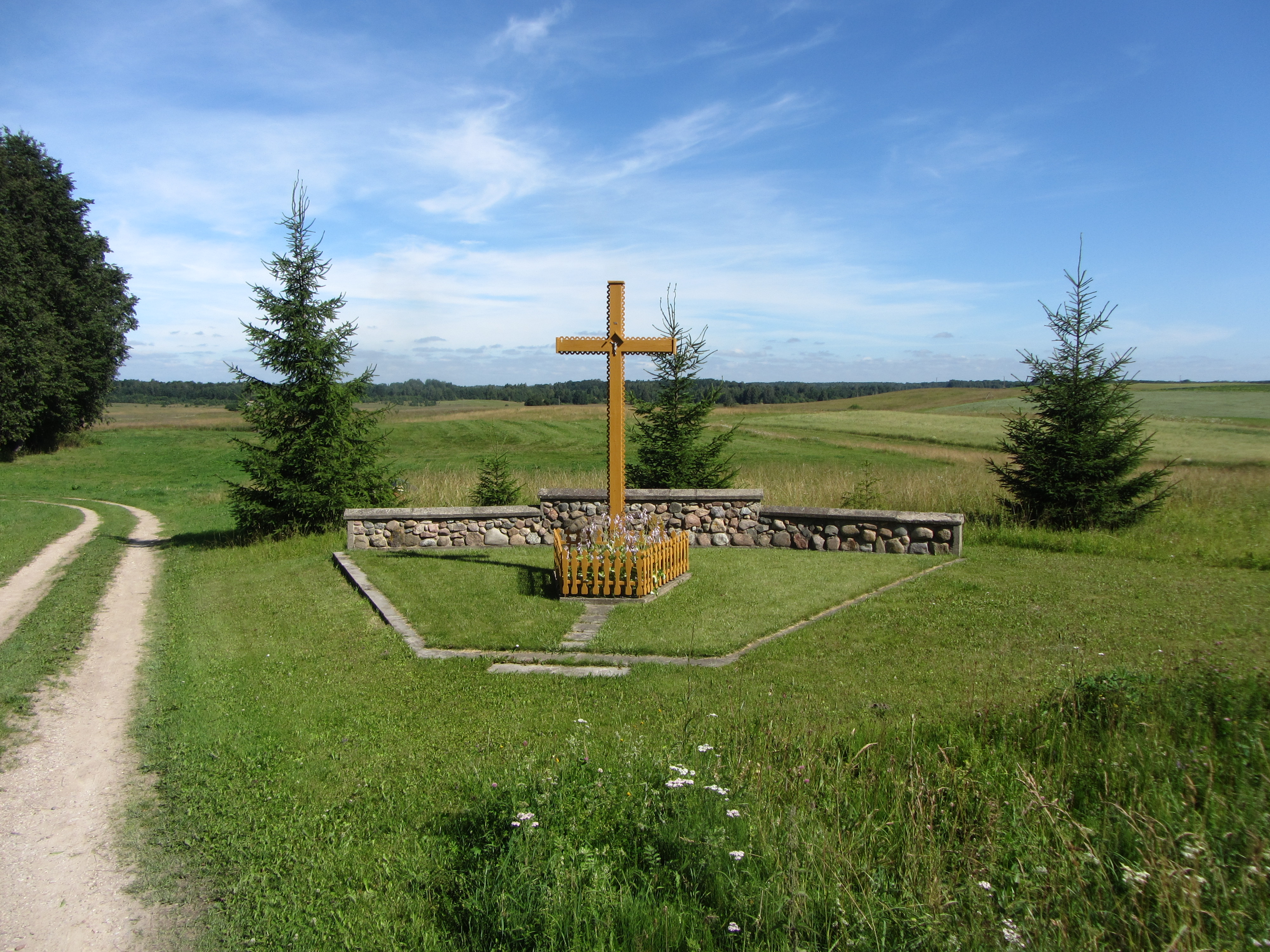 Paberžės sen., Lithuania